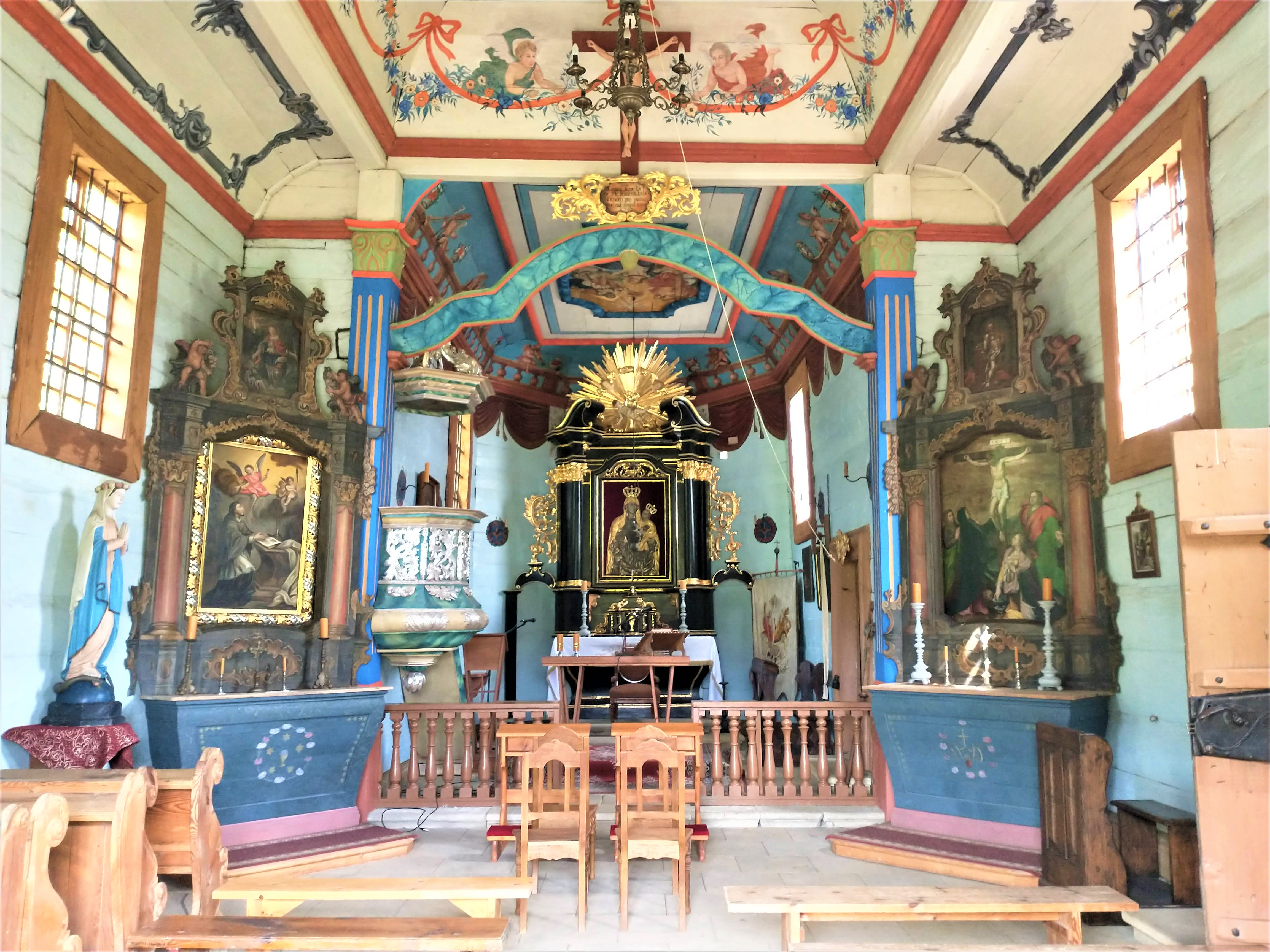 Kościół w skansenie w Tokarni.